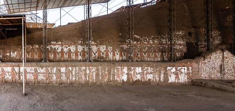 Huaca de la Luna, Trujillo, Perú. © Enrique Jara